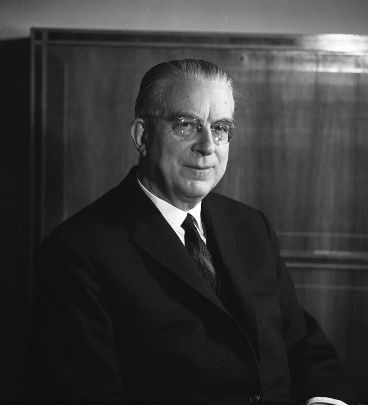 Portraitaufnahmen von Staatssekretär Globke